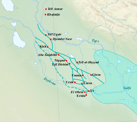 Sites de la Basse Mésopotamie durant le IVe millénaire av. J.-C. (période d'Uruk). Tracé des cours d'eau d'après Guillermo Algaze, Ancient Mesopotamia at the Dawn of Civilization: The Evolution of an Urban Landscape, Chicago, University of Chicago Press, 2008, fig. 5 p. 45.